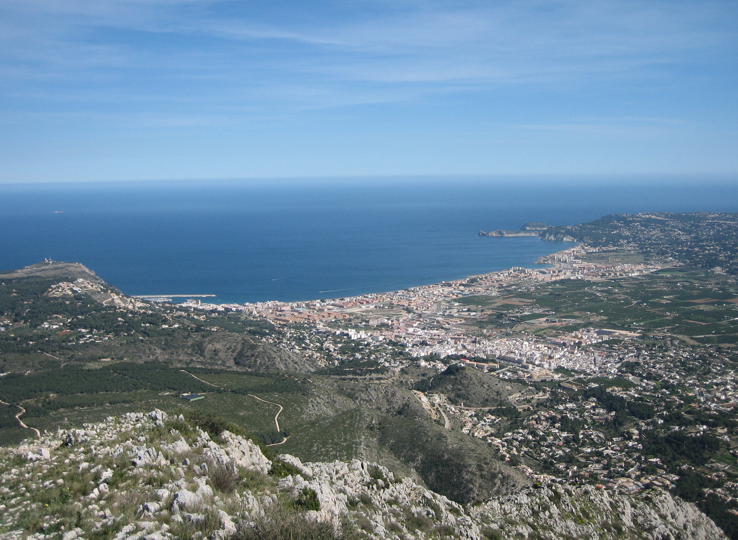 Vista de Jávea (Alicante, España) desde el descenso este del Montgó. Fotografía realizada por Rodriguillo el 26/03/2006.